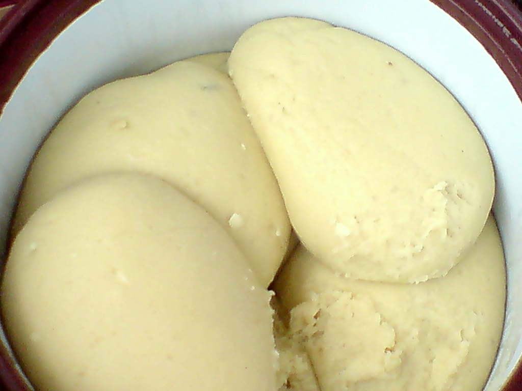 Des vrais paires de foutou igname africain à Bondoukou This is an image of food from Côte d'Ivoire